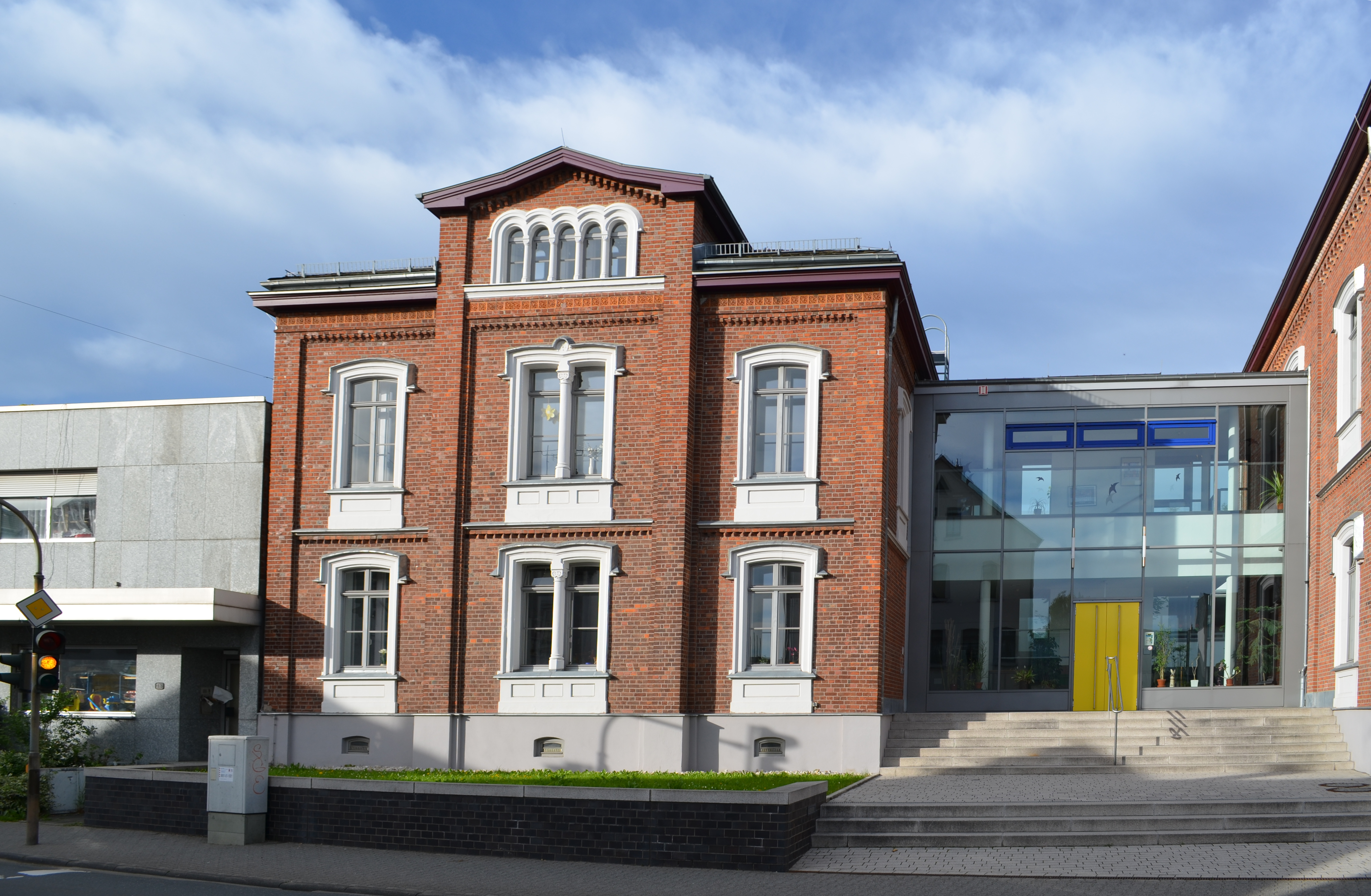 Bad Camberg, Freiherr von Schütz-Schule, Anbau